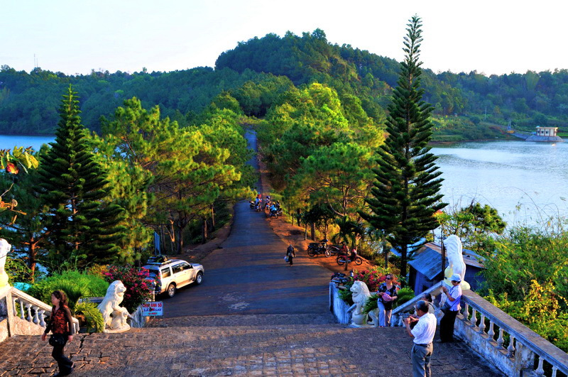 Chiều cao nguyên - Late afternoon in the Central High Plateaux